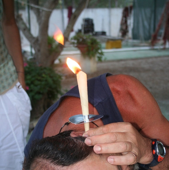 Coni per cerume auricolare